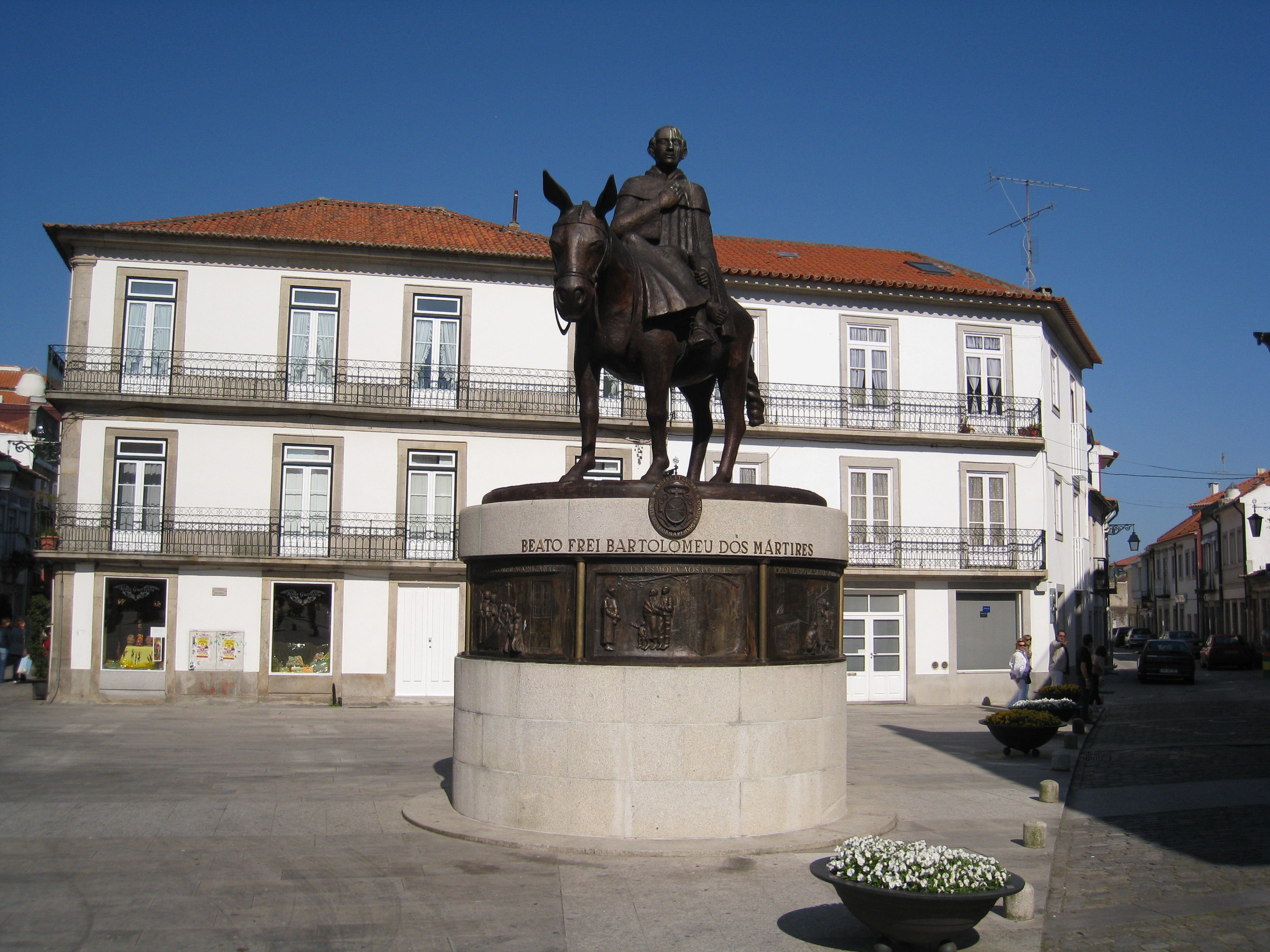 Largo de S. Domingos, Viana do Castelo